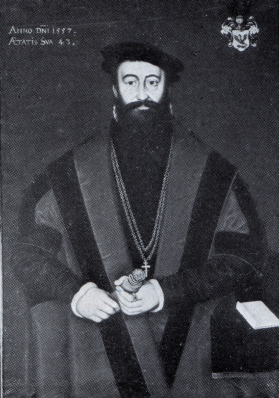 Hermann Falke (* 1514; † 1566), Bürgermeister von Lübeck